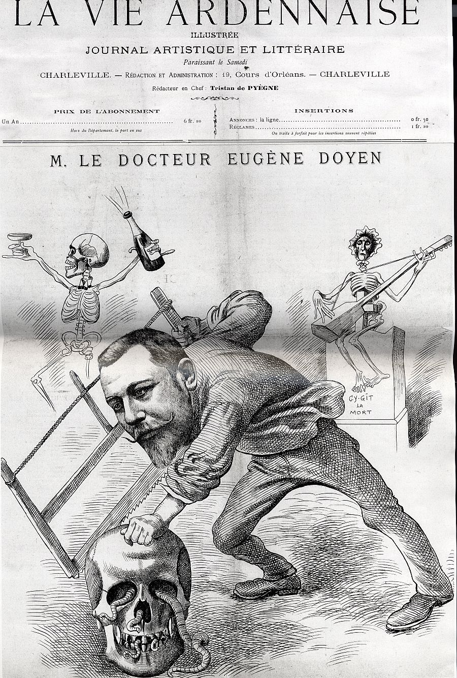 Caricature du docteur Eugène Doyen. La Vie ardennaise illustrée. Journal artistique et littéraire.